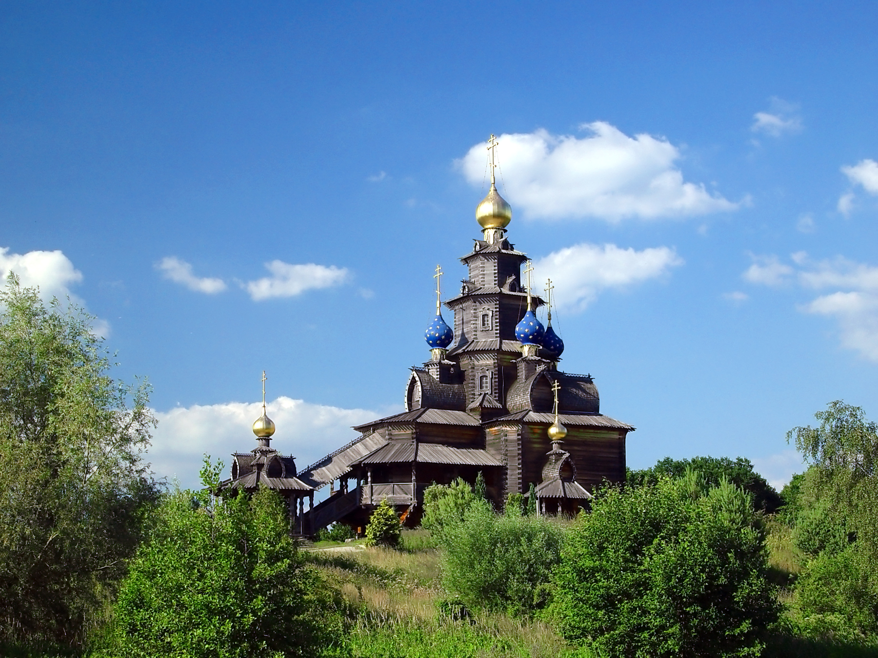 Beschreibung: Russisch-Orthodoxe Kirche auf dem Gelände des Mühlenmuseums in Gifhorn Aufnahmedatum: 1. Juli 2006 Fotograf: ArtMechanic